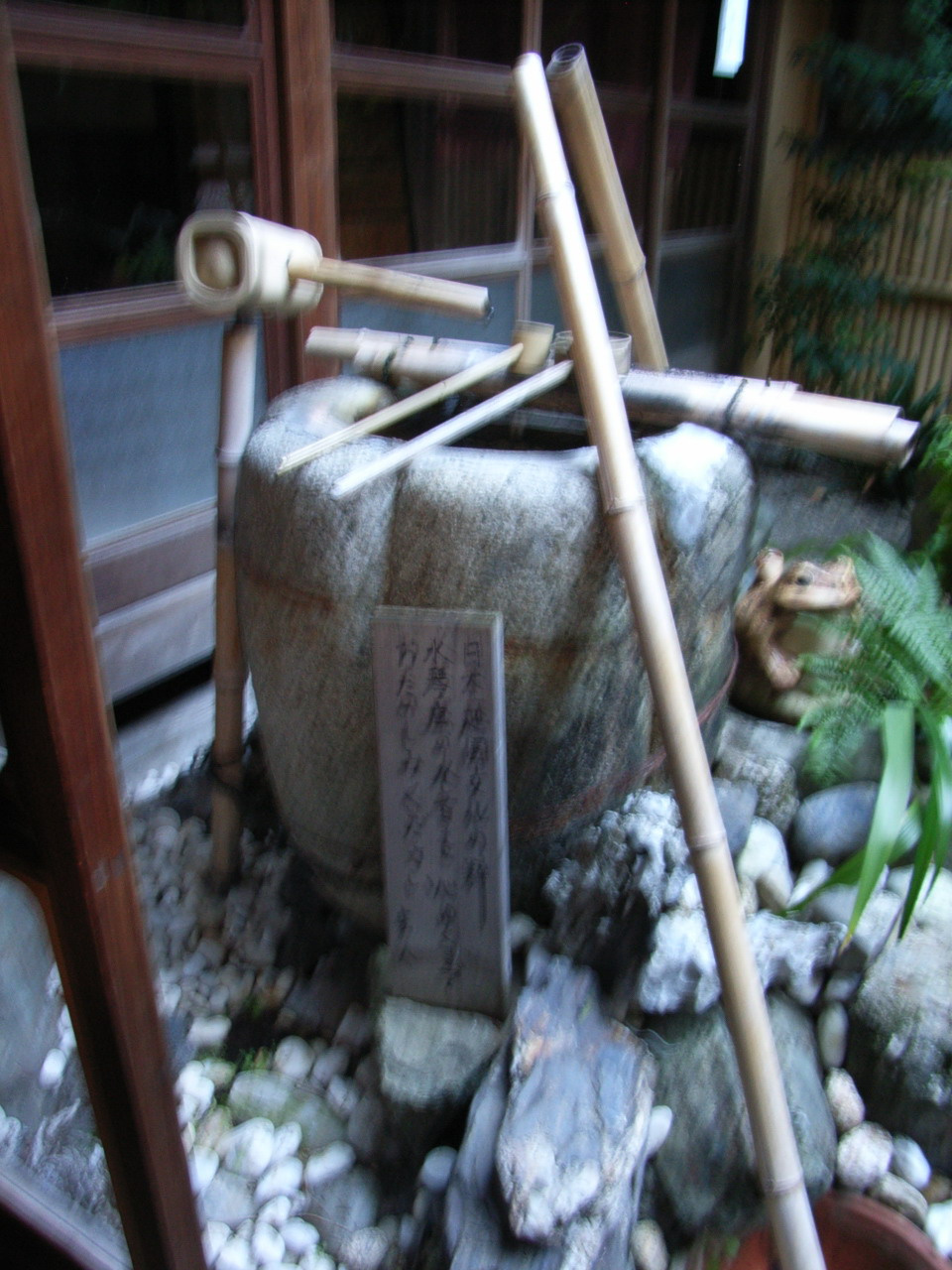 Суйкинкуцу. Японский музыкальный инструмент.